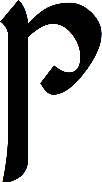 A „tinco” tengwa képe